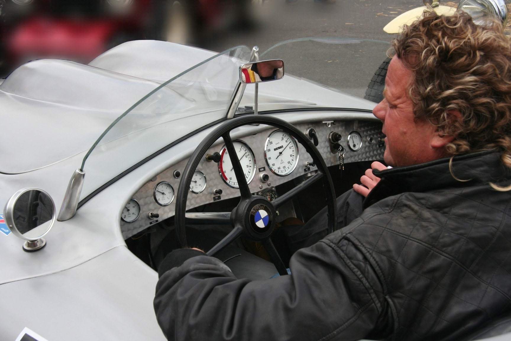 Großer Werkmeister, Rennsportwagen auf der Basis des BMW 328